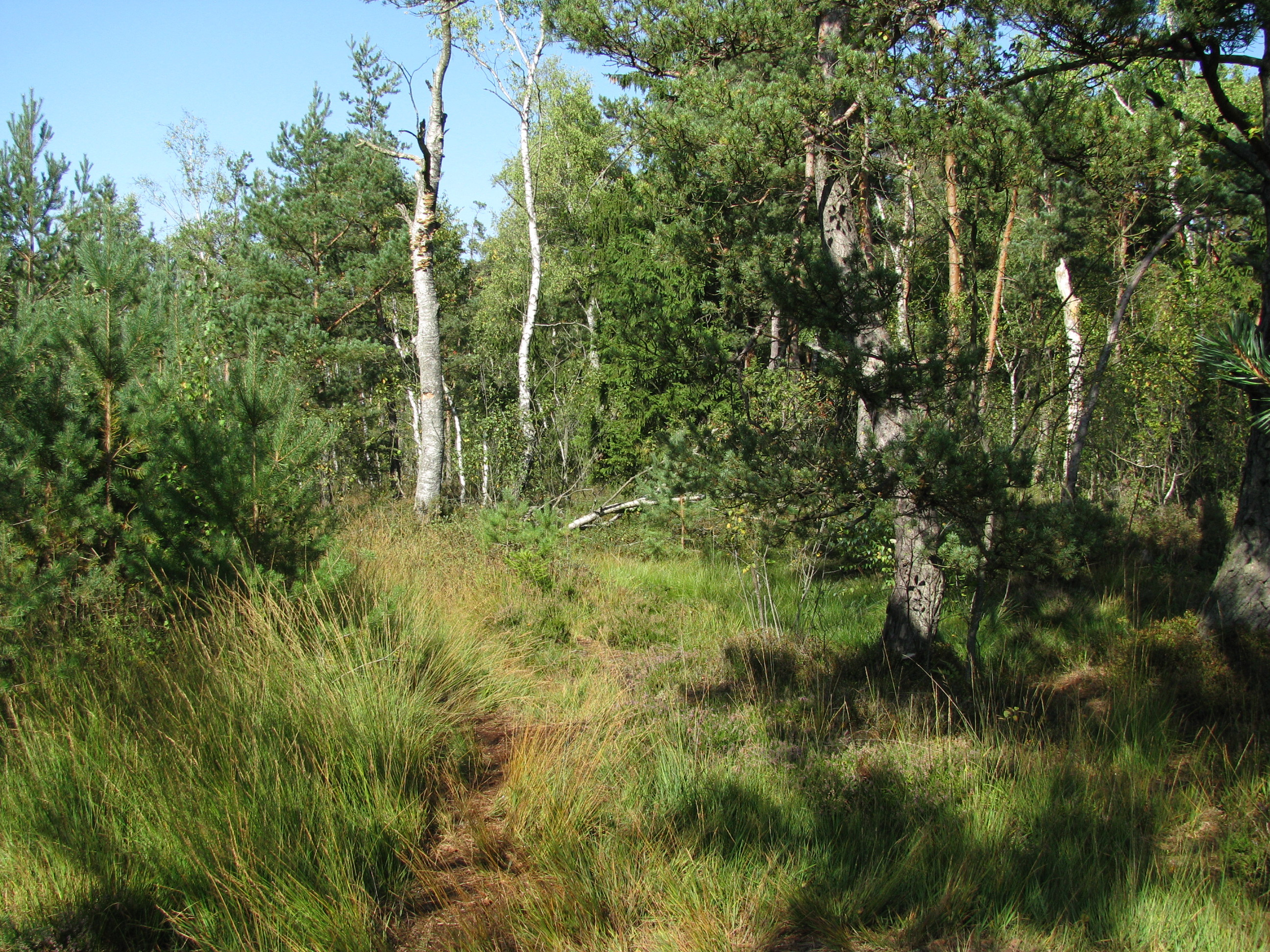 Haspelmoor